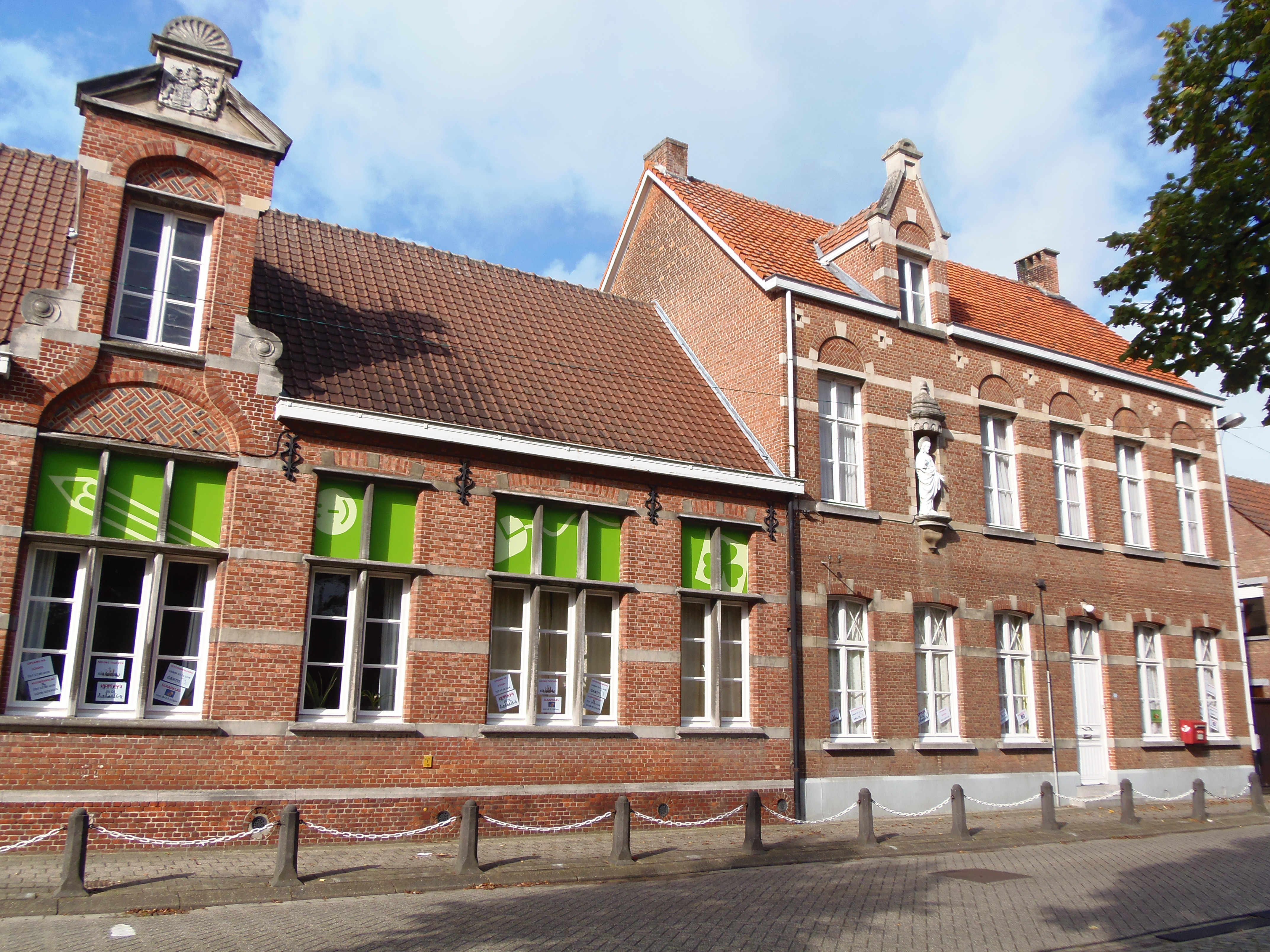 Bouwel, Dorp 55 en 57. Neotraditioneel geheel uit 1898